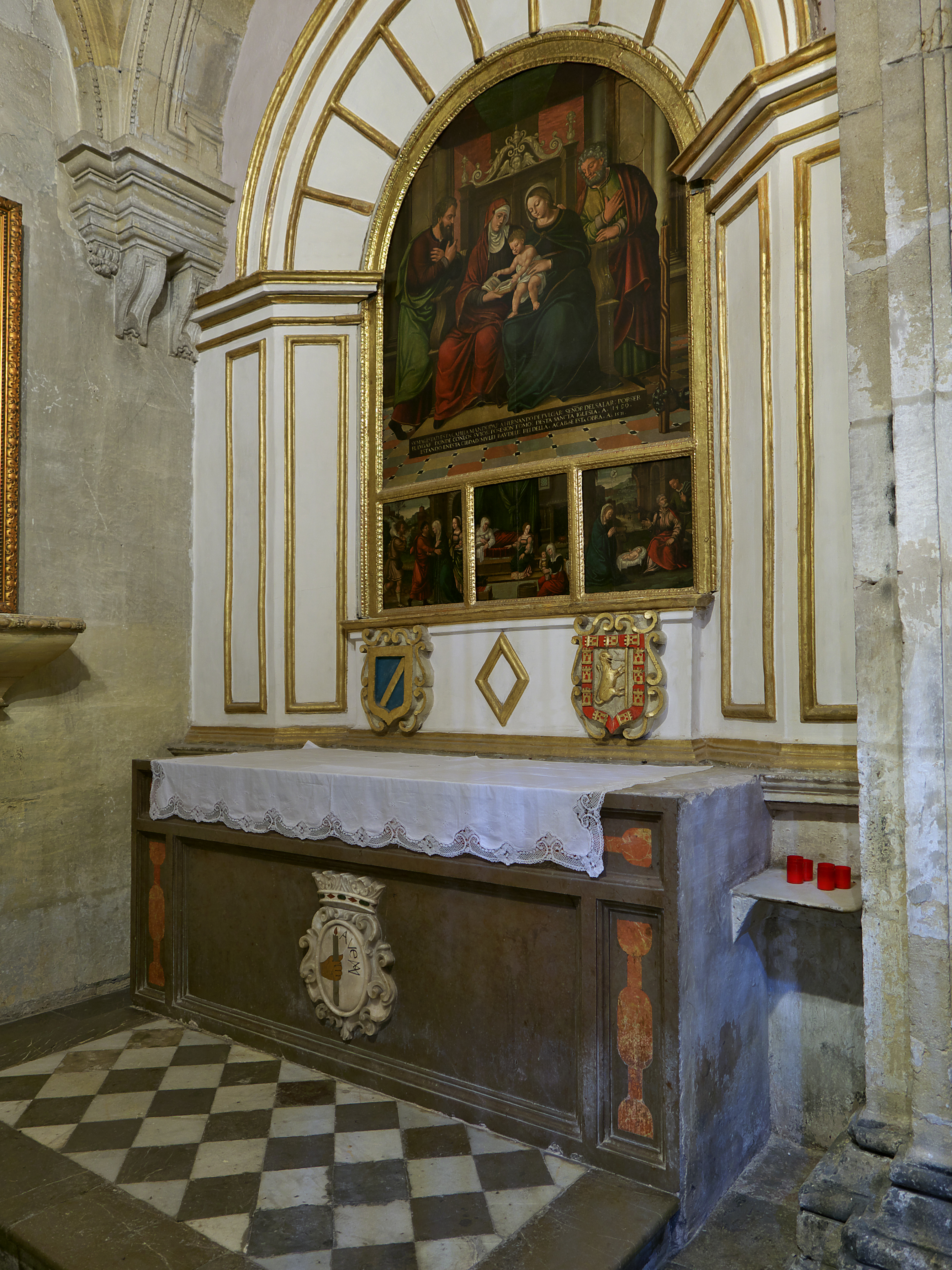 Iglesia del Sagrario (Granada). Altar de la capilla funeraria del héroe Hernán Pérez del Pulgar (†1531)